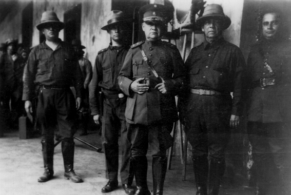 el General José Tomás Calderón «Chaquetilla Calderón», abuelo del ex presidente Armando Calderón Sol.